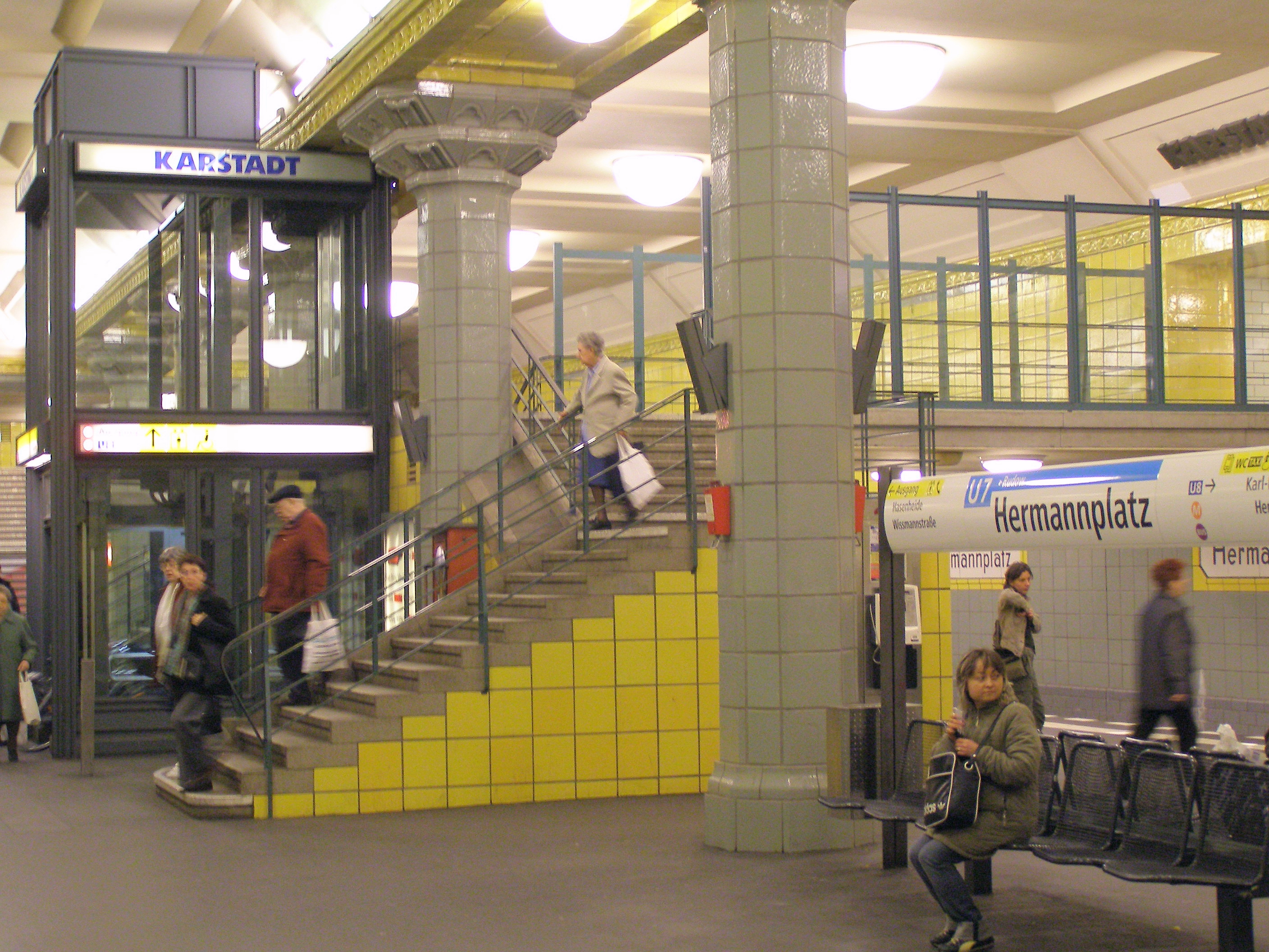 U-Bahn Herrmannplatz (Berlin), Direktzugang zum Kaufhaus underground station Hermannplatz (Berlin), direct entrance to a store stanice metra Hermannplatz (Berlín), přímý vchod do obchodníhodomu